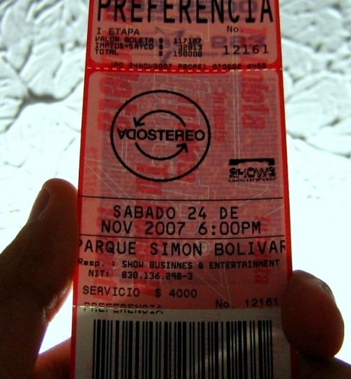 "Soda Bogotá". Entradas para el recital de Soda Stereo en Bogotá, Colombia. Gira: Me Verás Volver